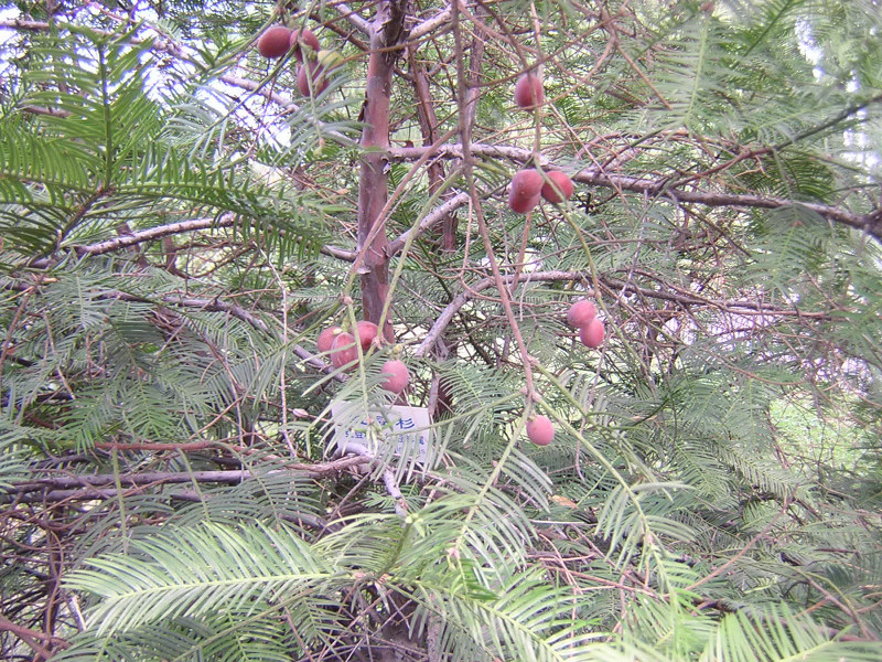 三尖杉，自攝於北京清華大學綠園。